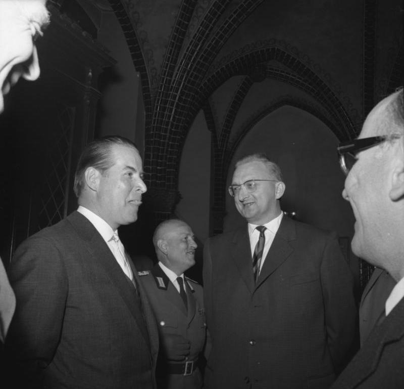 10 jähriges Bestehen des BGS: Empfang des Bundesinnenministers im Rathaussaal Lübeck